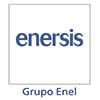 Enersis logo